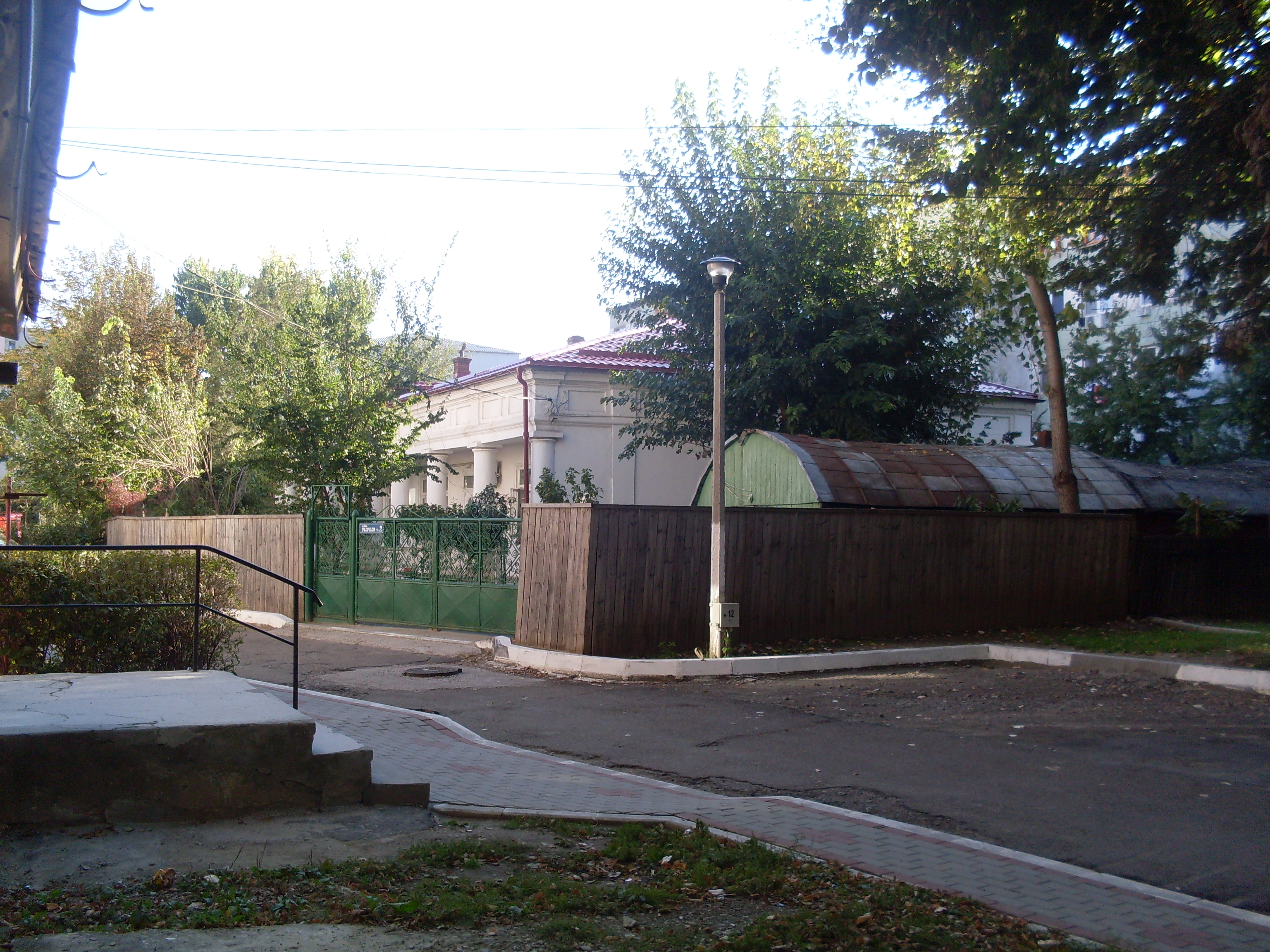 Casa Vornicul Tiron